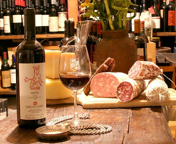 Salumi e vino lucchese.